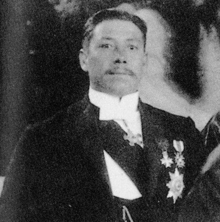 Alphonse Bernard Splingaerd, fils aîné de Paul Splingaerd, portant ses décorations lors d'un banquet à Lanzhou (Gansu - Chine) en 1908